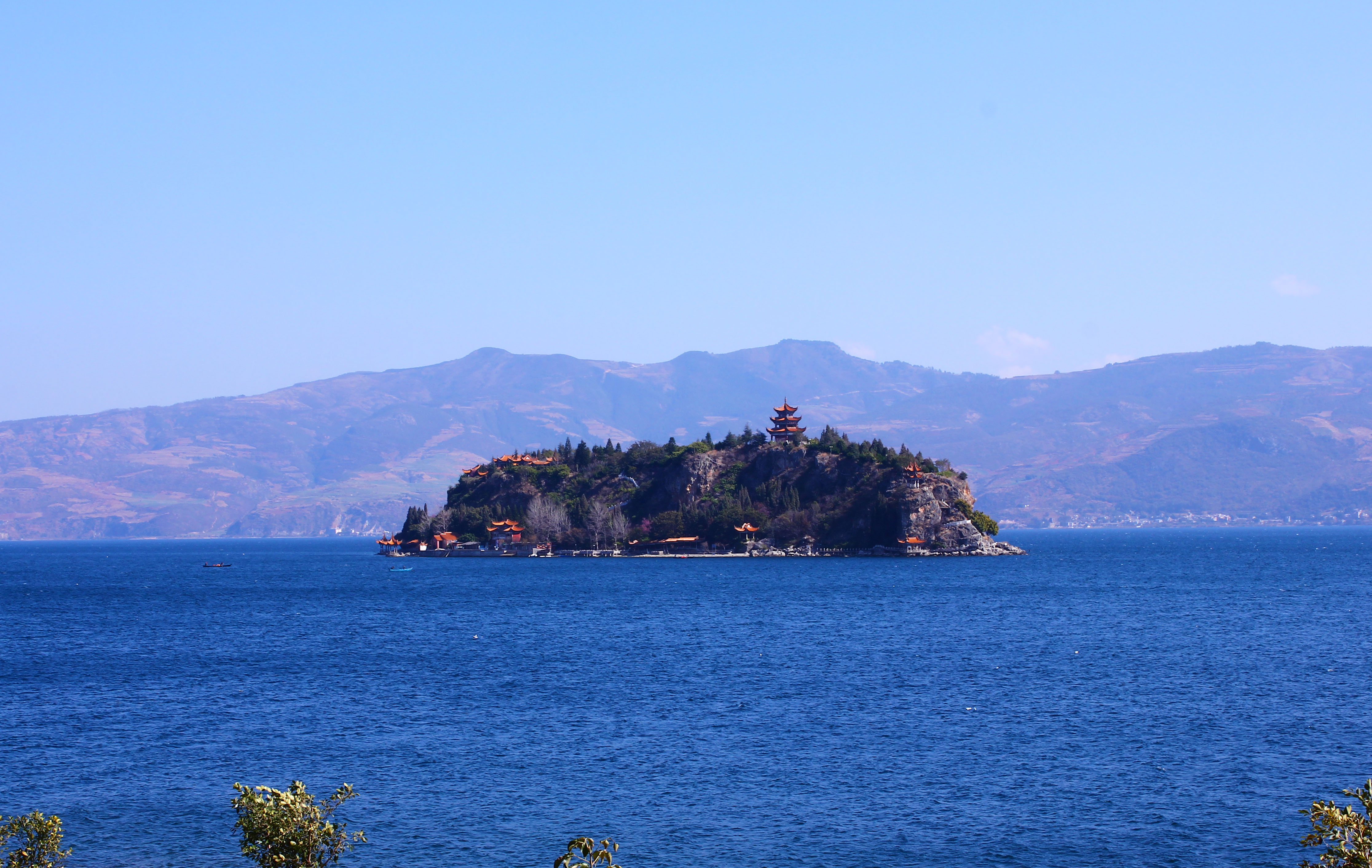 位于抚仙湖南部的孤山岛。